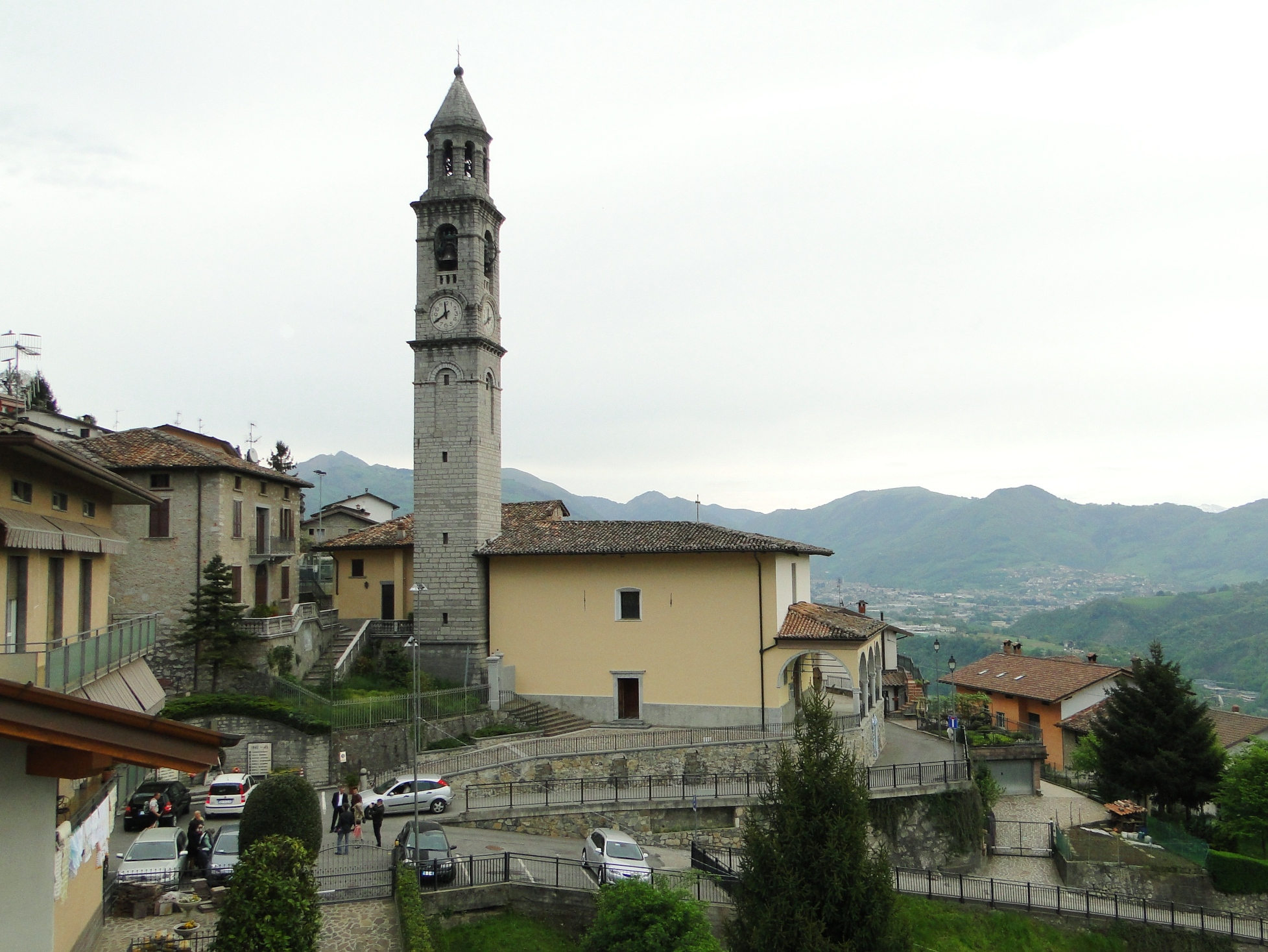 Chiesa parrocchiale della SS. Trinità di Orezzo, frazione di Gazzaniga (BG), Italia